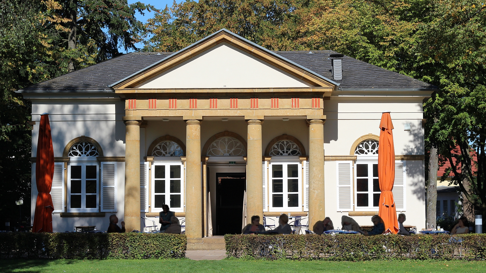 Dies ist das das Gartenhaus im Nordpark der kreisfreien Stadt Bielefeld. Es ist auch unter dem Namen "Schinkel-Pavillon" bekannt. Es liegt im Bezirk Mitte, Bünder Straße, Hausnummer 25bThis is a photograph of an architectural monument., no. 35